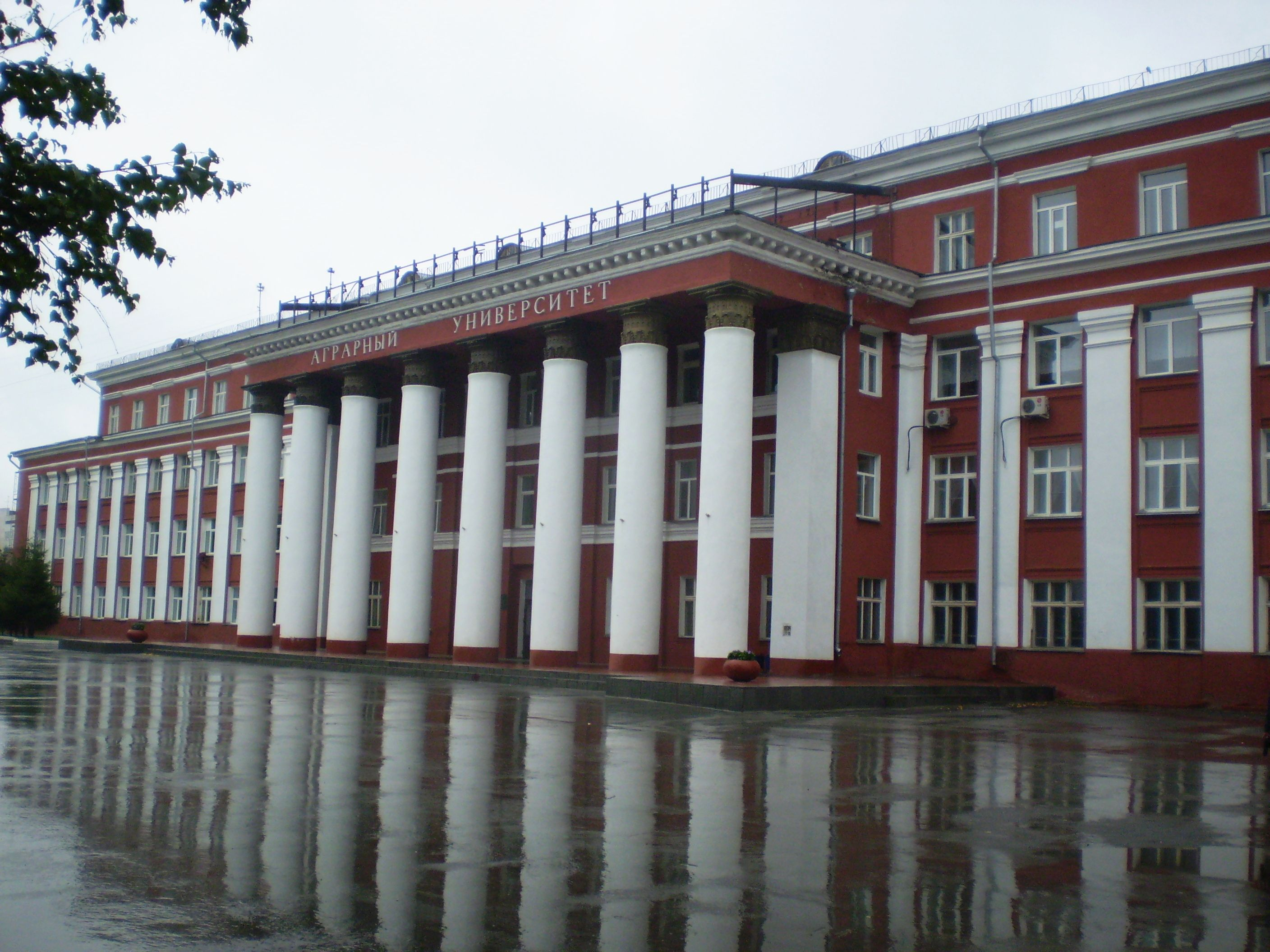 Главный вход НГАУ